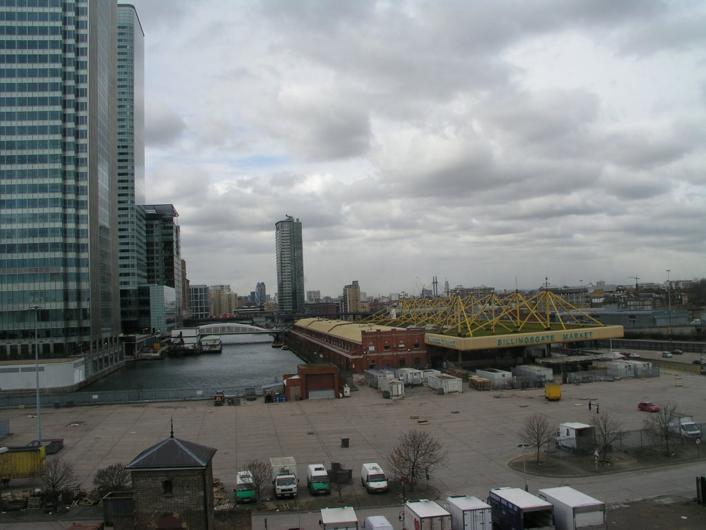 Já, autor této fotografie, ji uvolňuji jako Public Domain